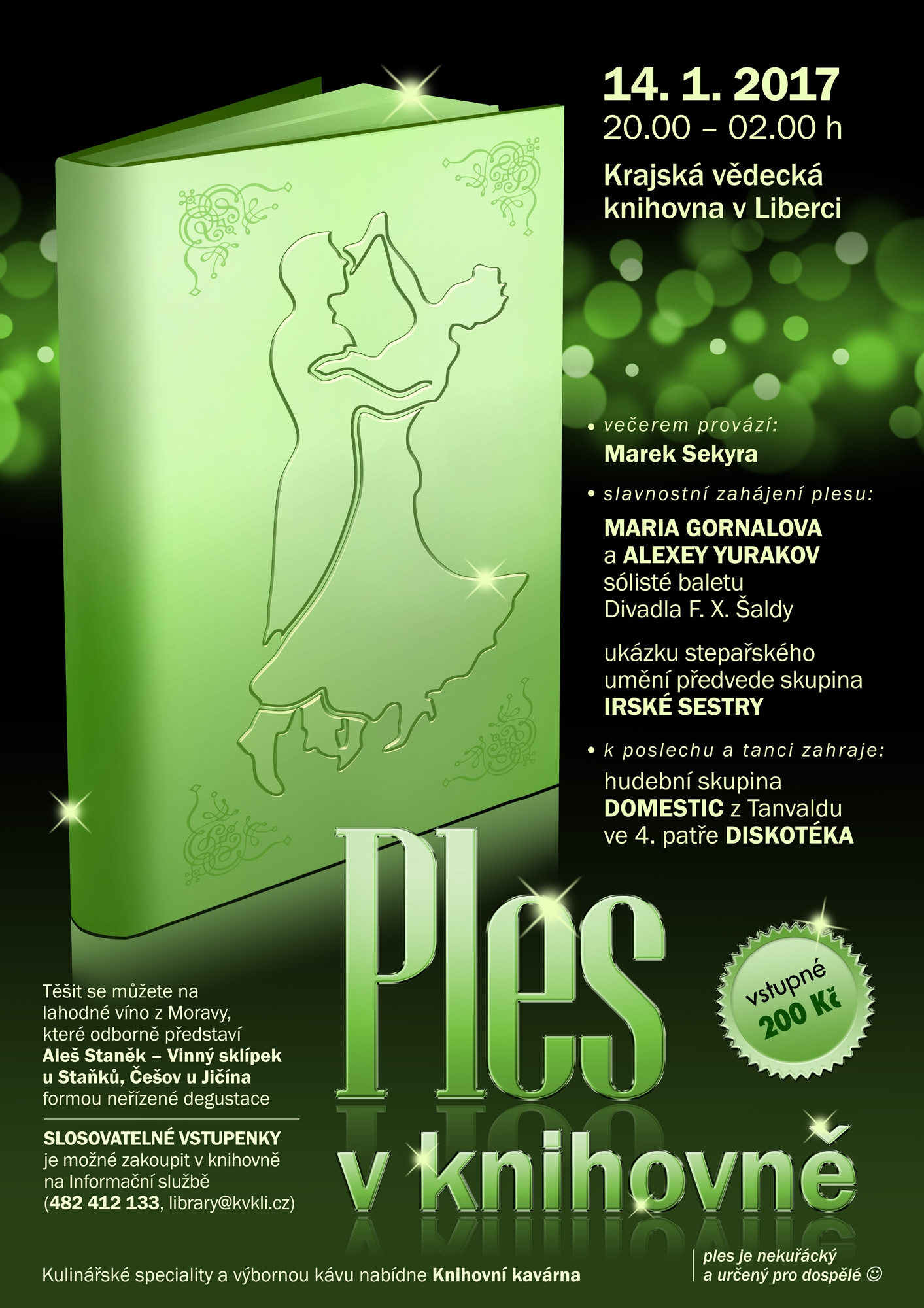 Pozvánka na Ples knihovny 2017